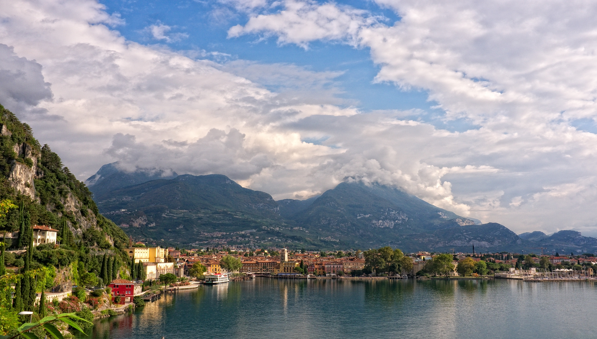 Riva del Garda : Panorama